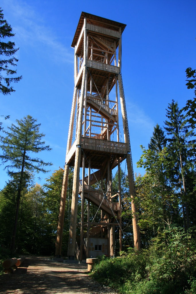 Der imposante, 45 m hohe Chutzenturm.